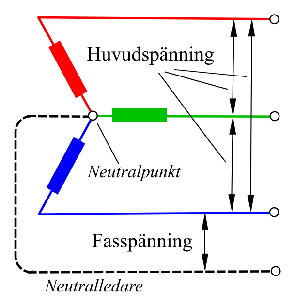 Trefaskoppling, Y-koppling